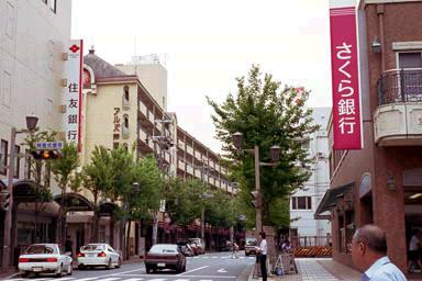 住友銀行とさくら銀行の合併直前の様子（住友銀行芦屋支店・さくら銀行芦屋駅前支店）